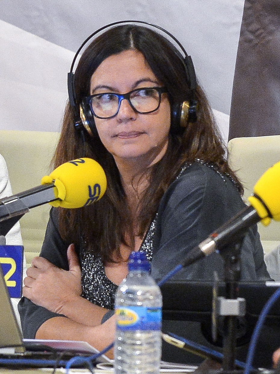 15.01.26-Entrevista-6-Hora 25